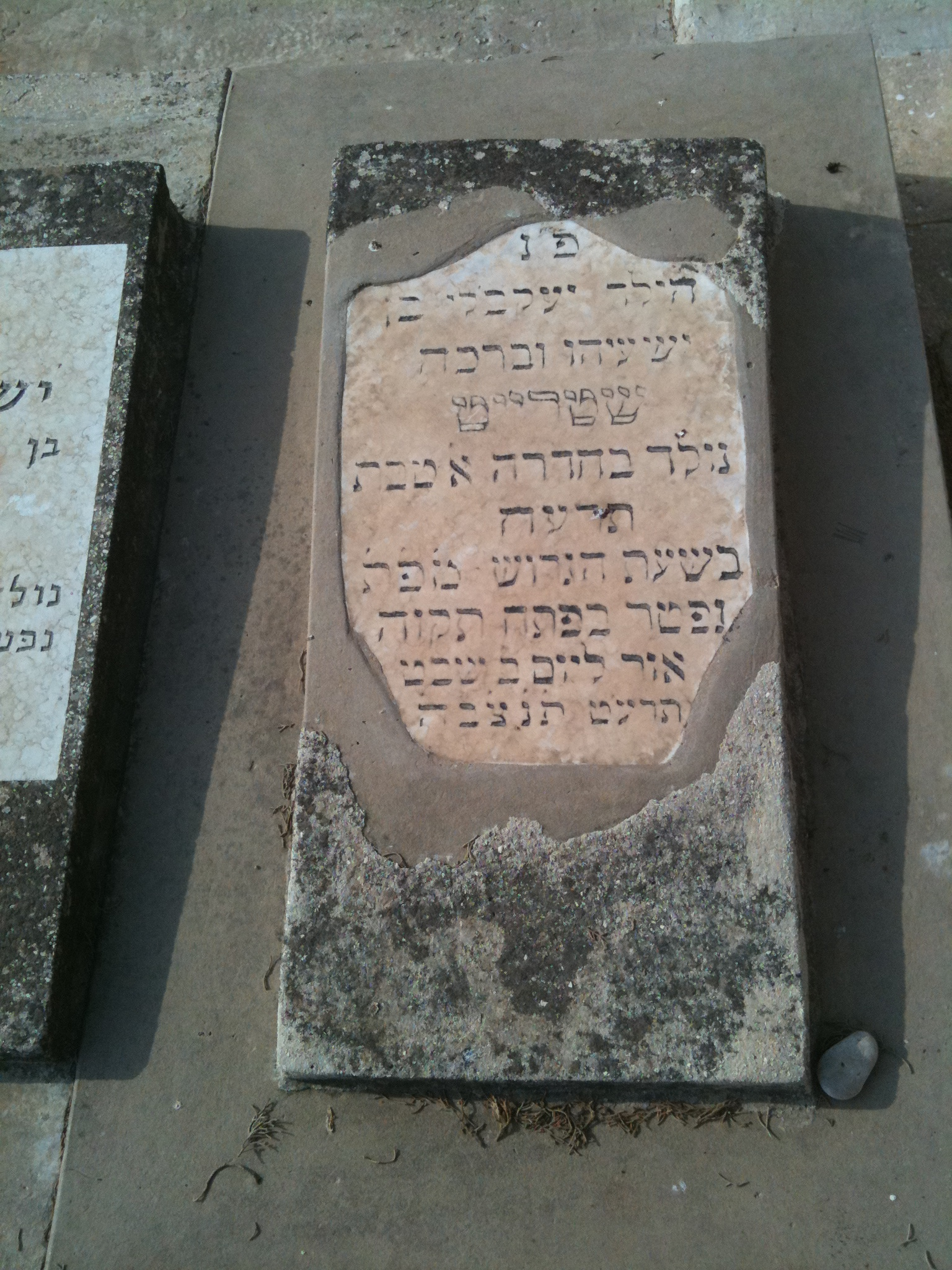 מצבה בבית העלמין סגולה. מצבת ילד שנולד בתקופת הגירוש - משפחתו גלתה מפתח תקווה לחדרה, ושם נולד בשנת 1917. הוא נפטר בשנת 1919, לאחר חזרת המשפחה לפתח תקווה